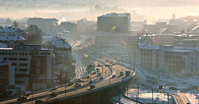 Danmarksplass er svært forurenset om vinteren.